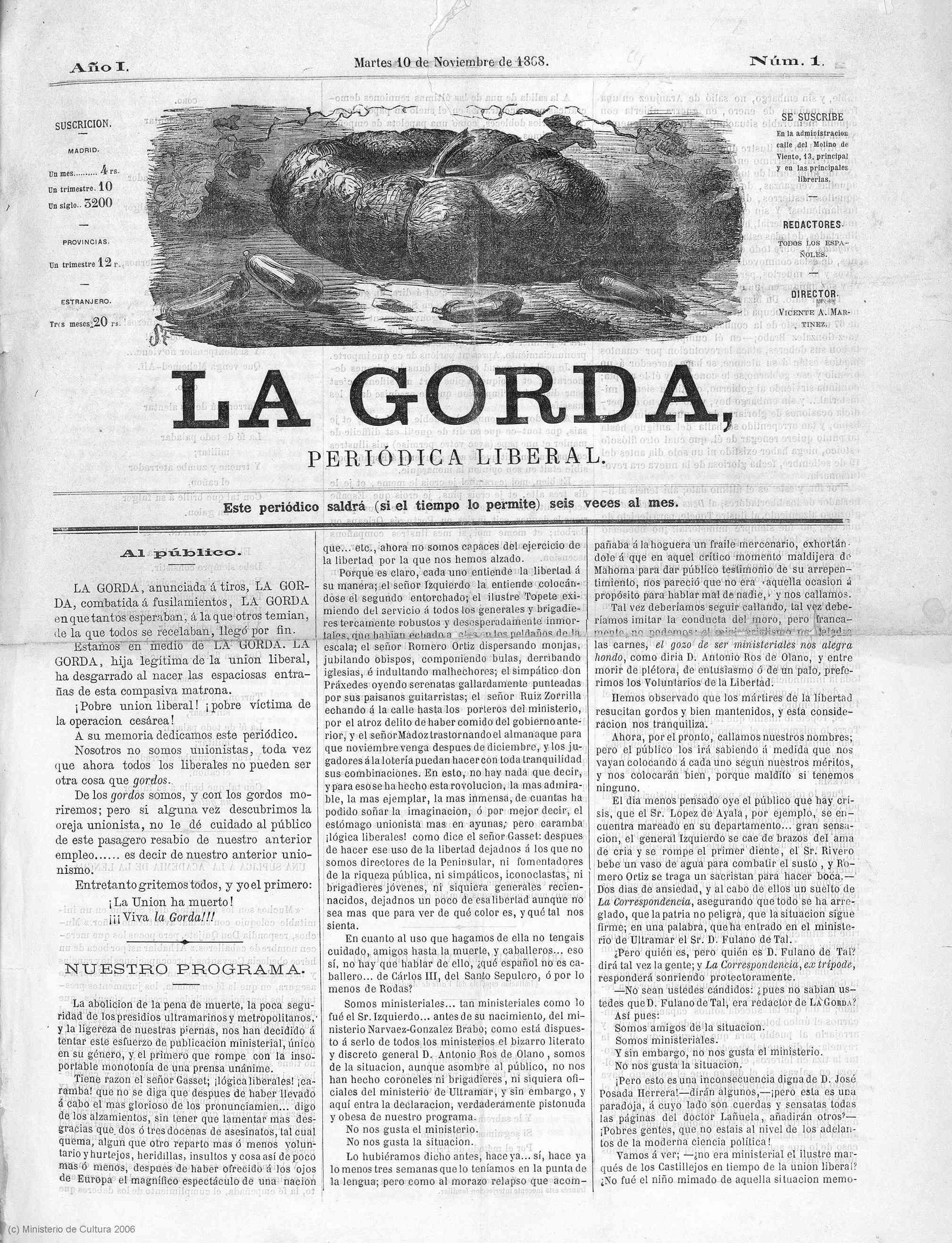 Primeira páxina da revista La Gorda (10 de novembro de 1868)